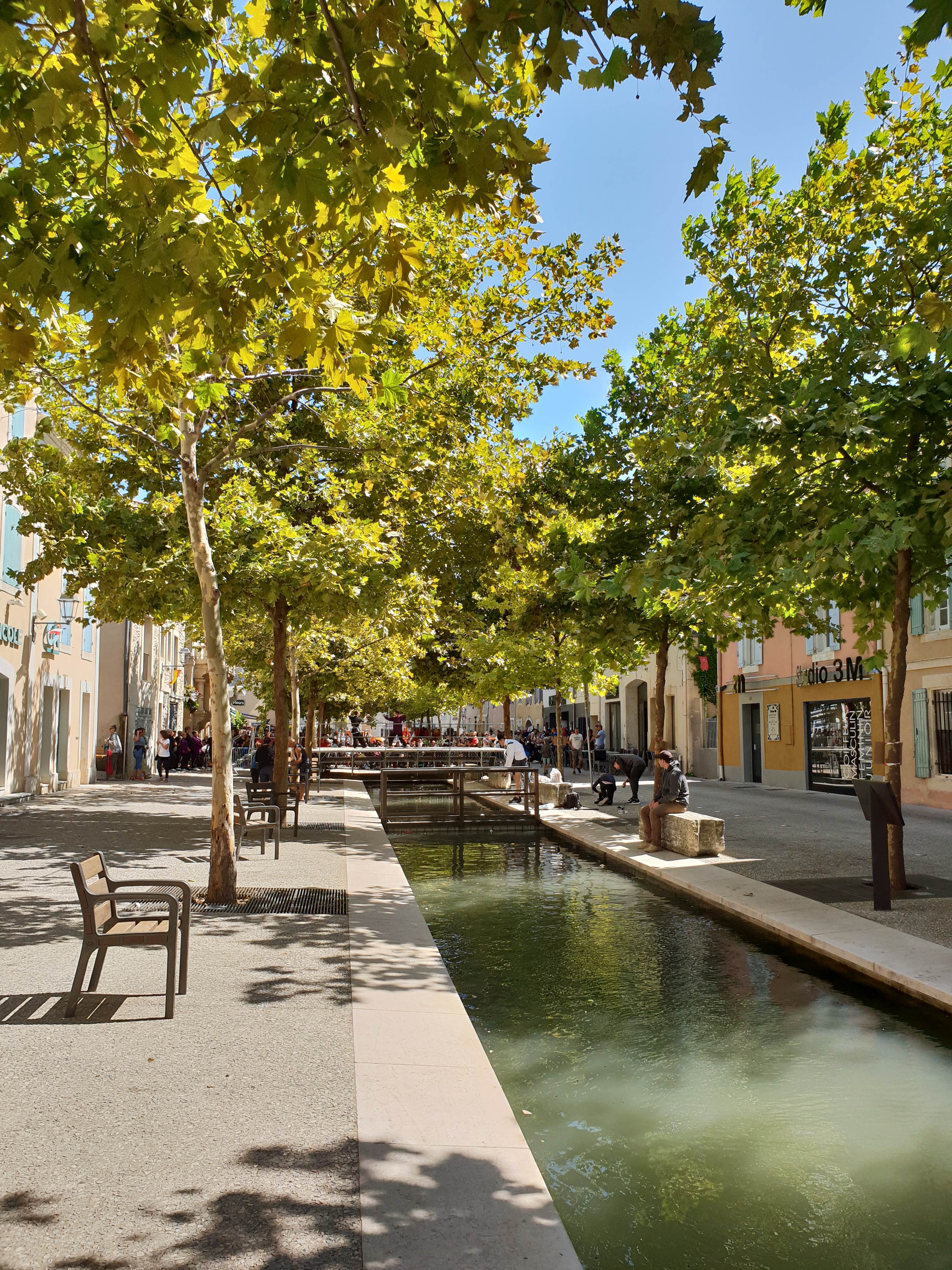 Seul tronçon de la Roubine des Moulins encore découvert dans le village